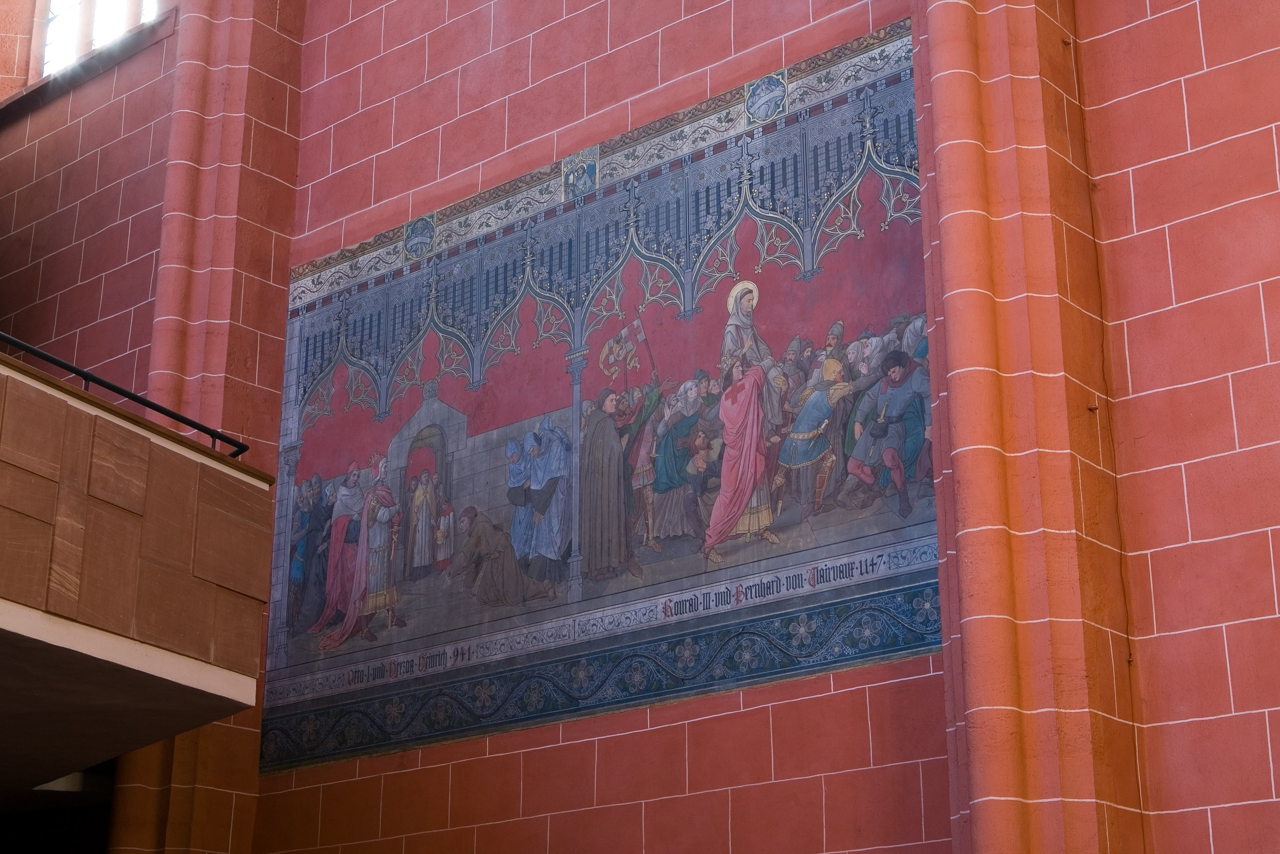 Aus dem 19. Jahrhundert stammender Rest der Wandmalerei von Eduard von Steinle im Südquerhaus des Kaiserdom St. Bartholomäus in Frankfurt am Main. Doppellizensierung GFDL & CC-BY-SA 2.5.